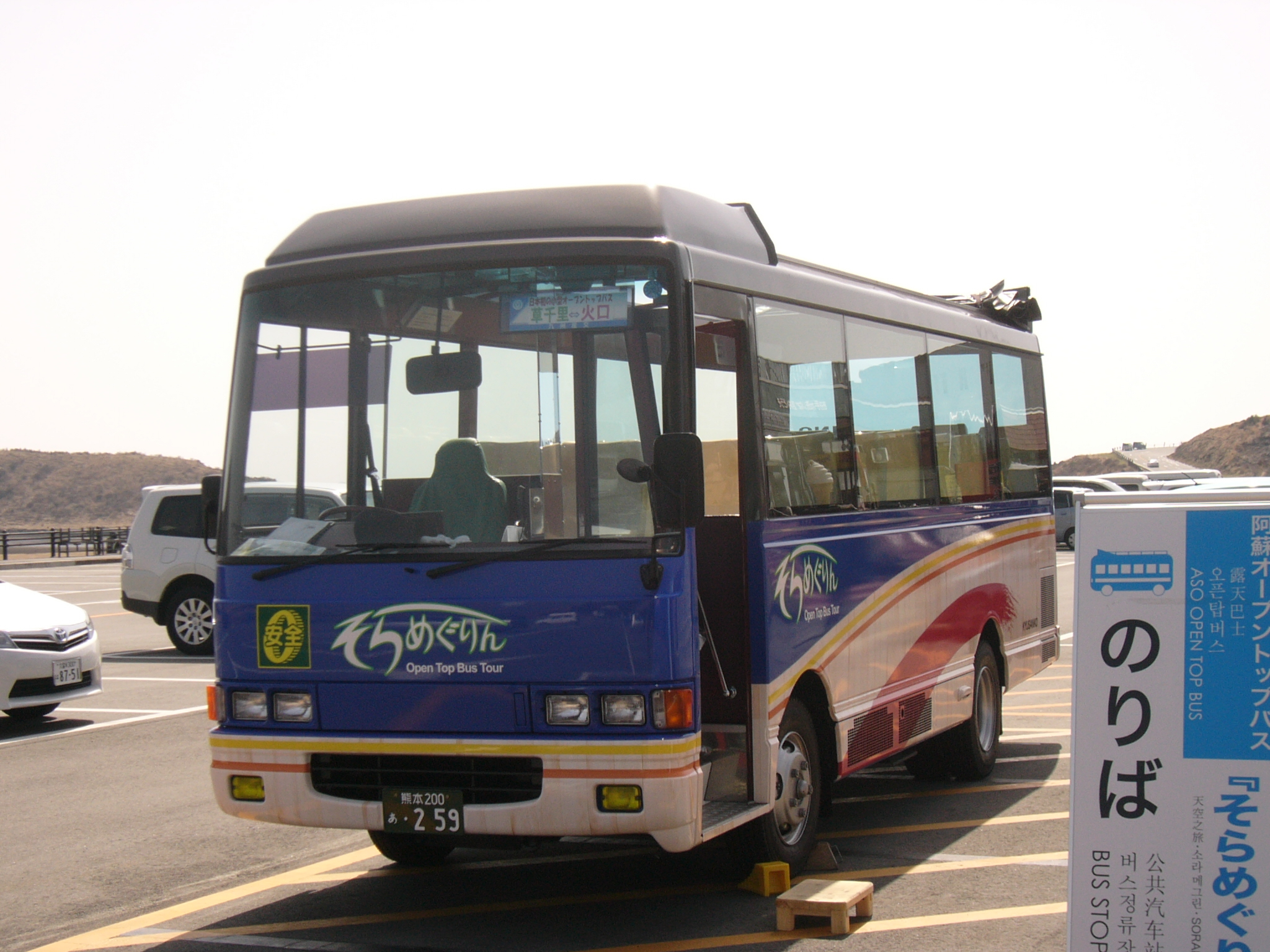 登録番号：熊本200あ259（阿蘇オープントップバス「そらめぐりん」） 撮影場所：阿蘇草千里にて